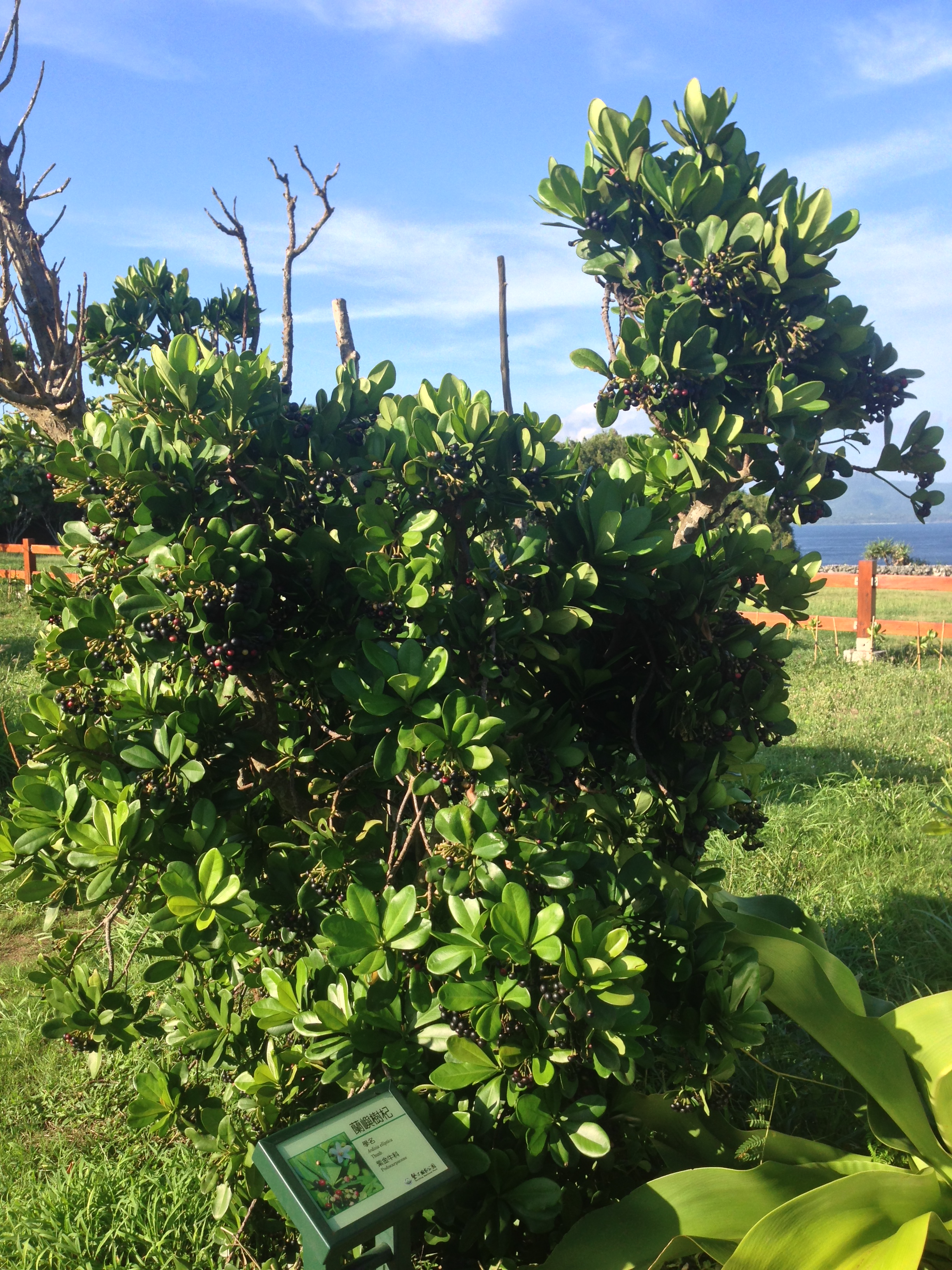 貓鼻頭公園蘭嶼樹杞